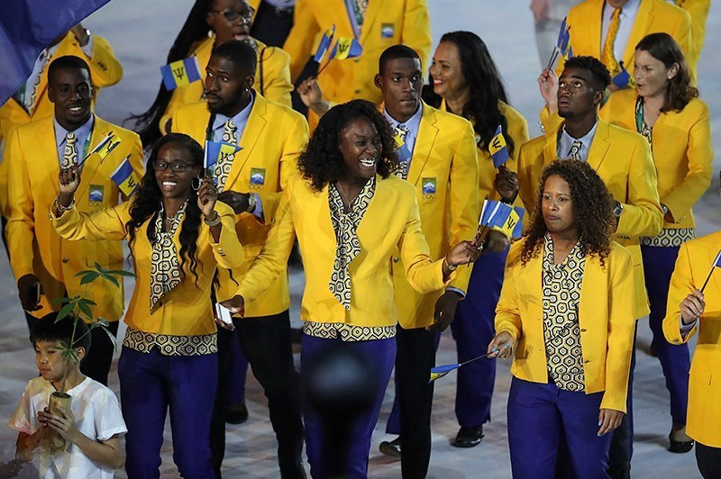 Делегация Барбадоса на открытии Летних Олимпийских игр 2016 в Рио-де-Жанейро